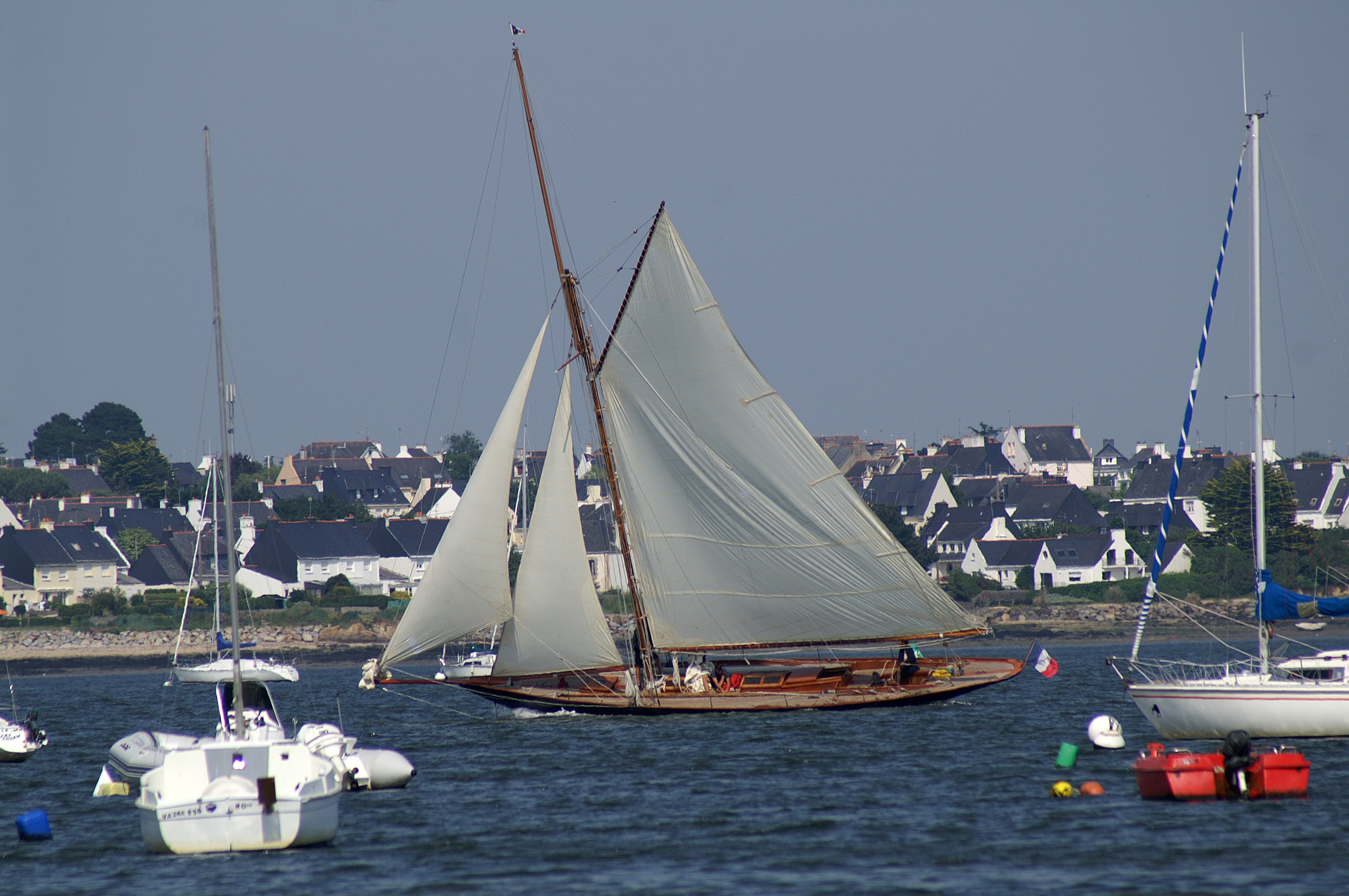 Pen Duick sous voile en rade de Lorient, vue du Kernevel à Larmor-Plage.